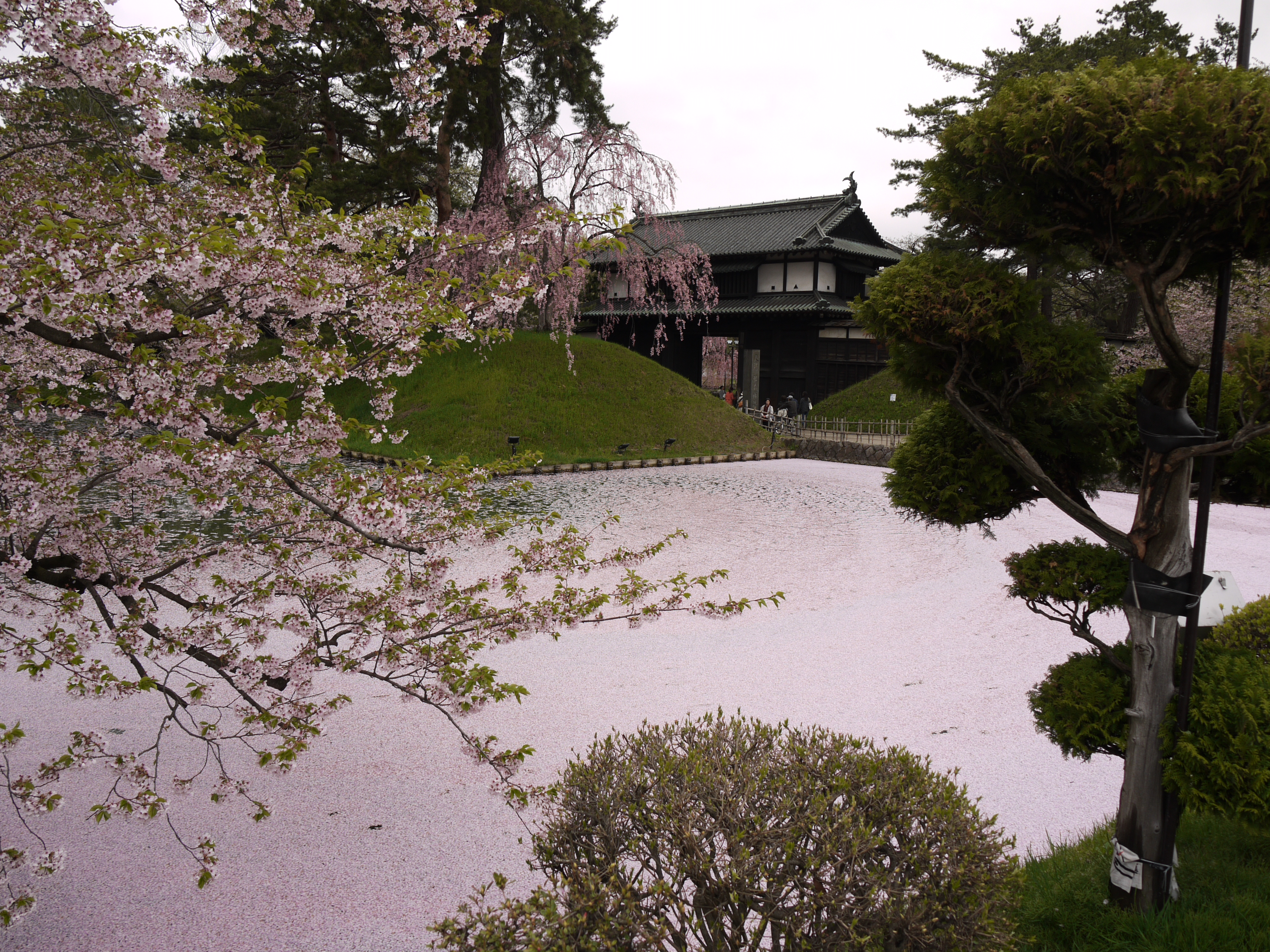 弘前さくらまつり お堀の様子